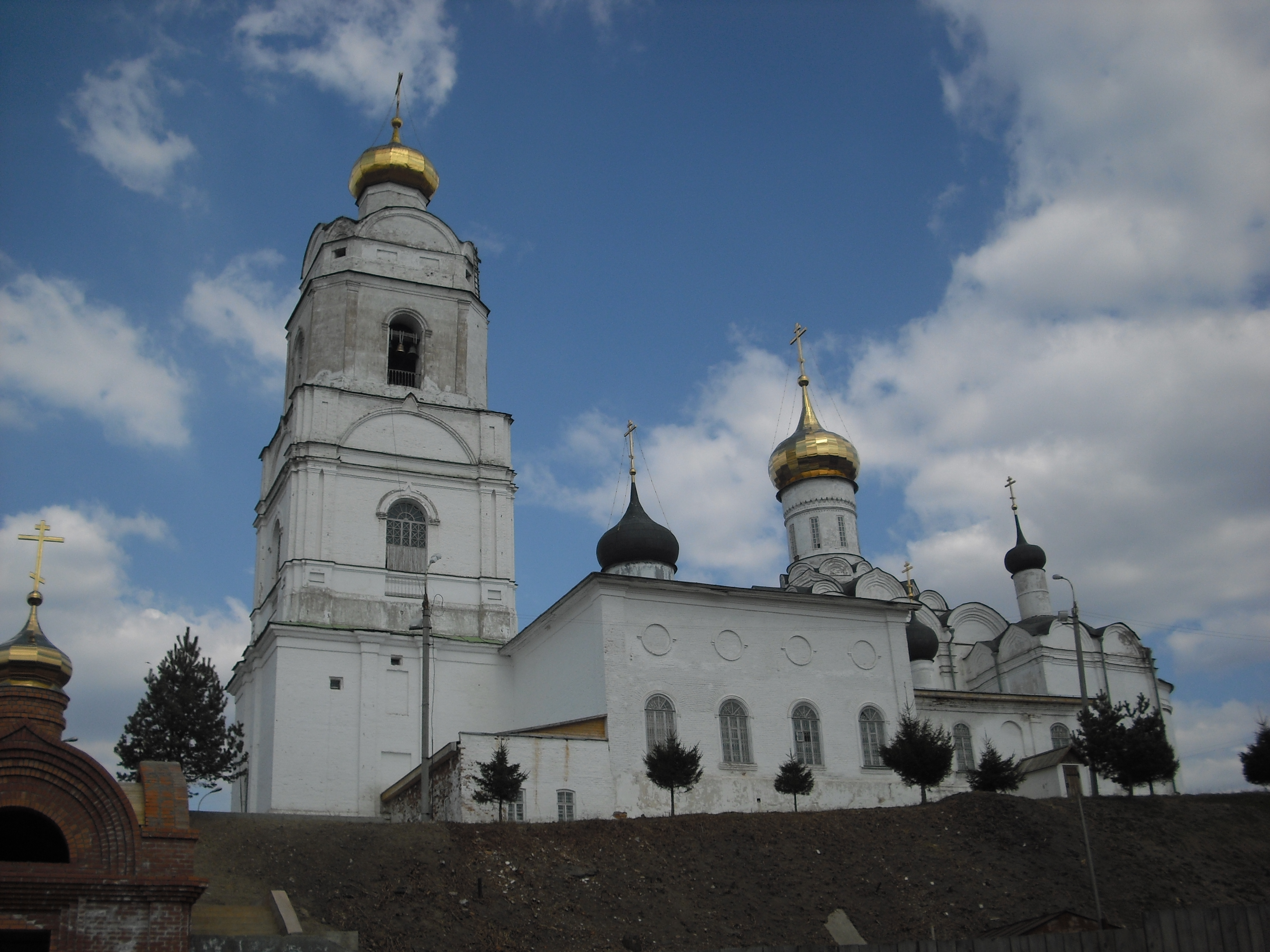 Свято-Троицкий собор в Вязьме